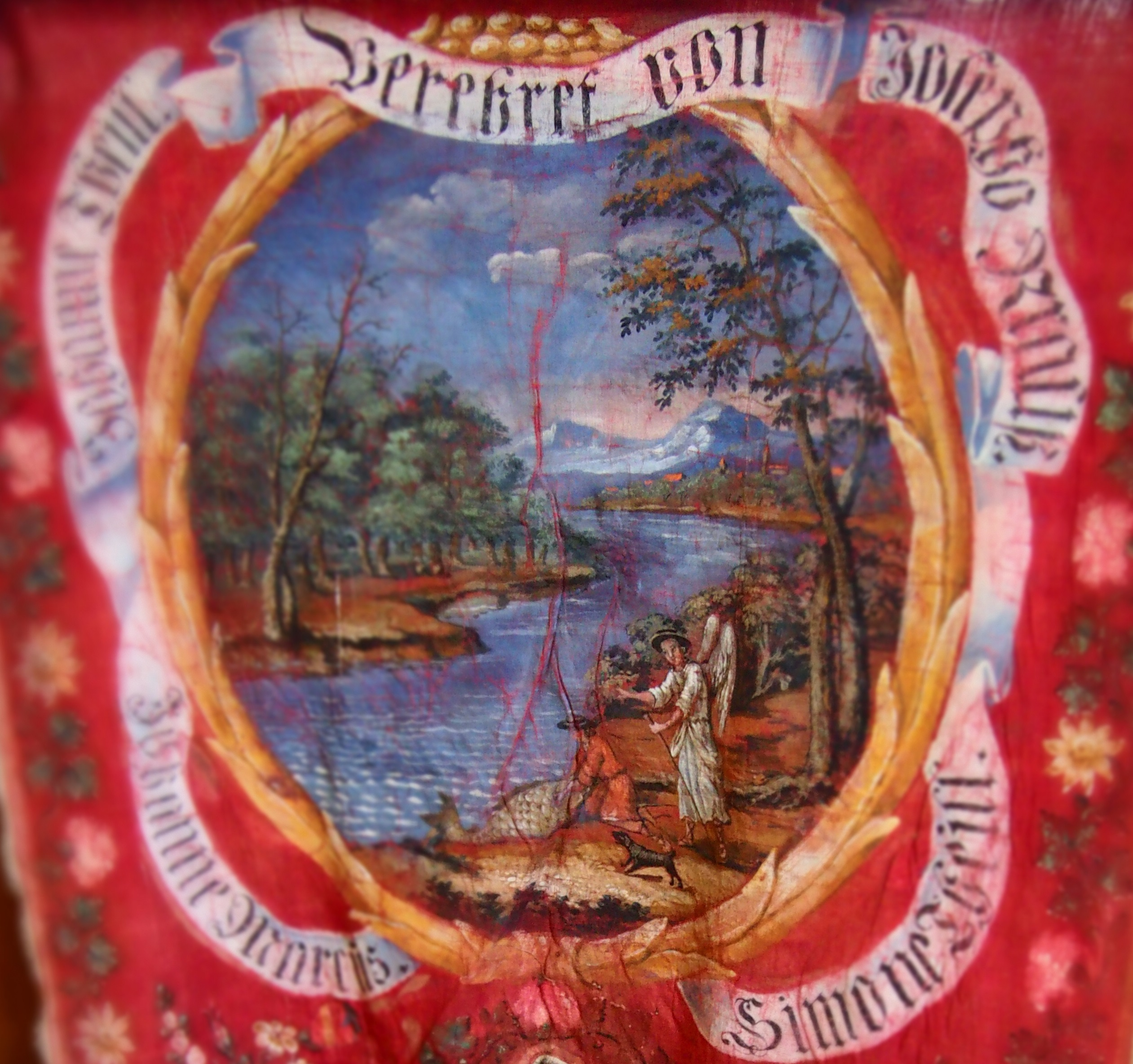 Steag săsesc din Bradu din 1775